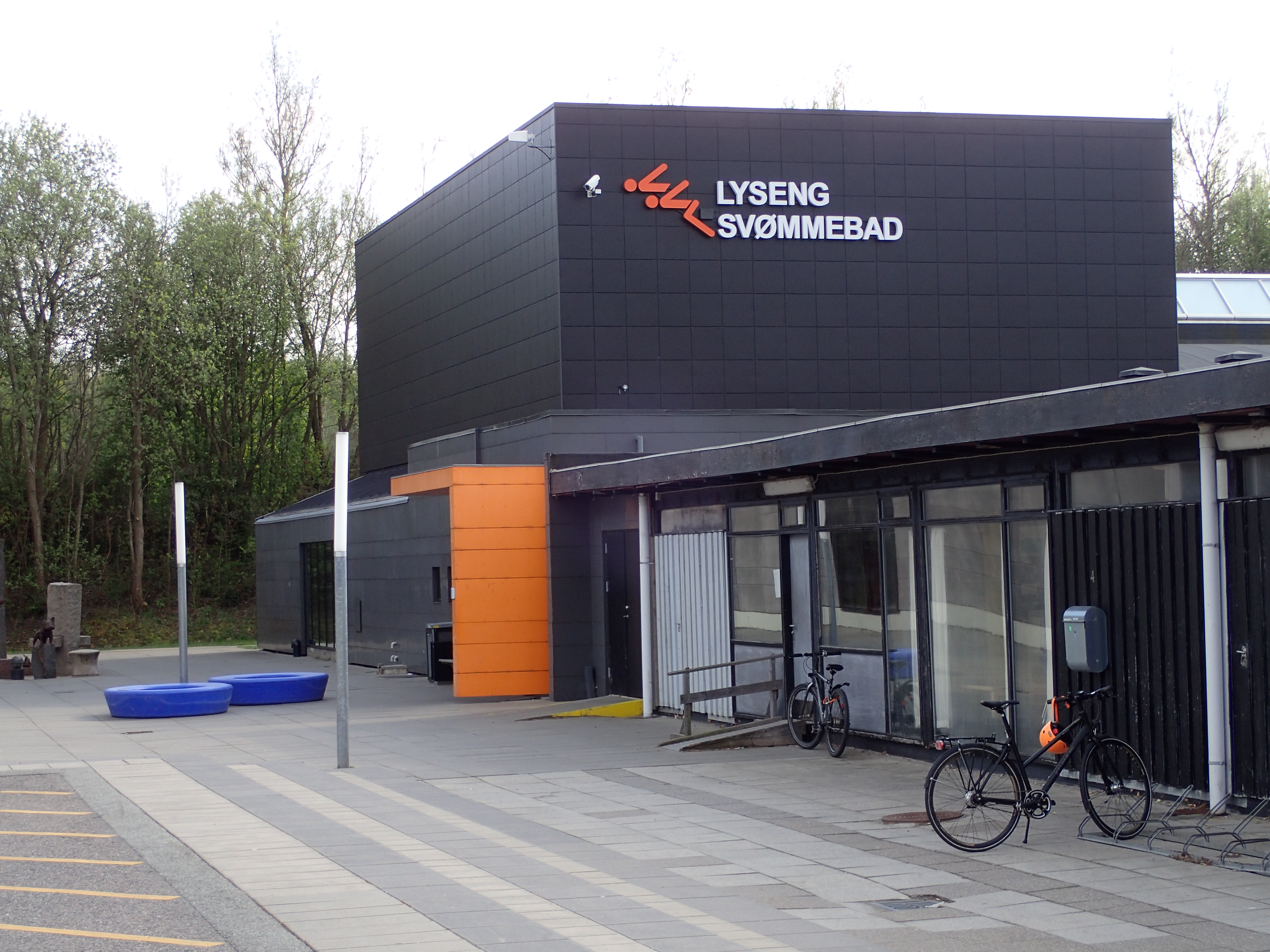 Lyseng Svømmebad, indgangsparti.